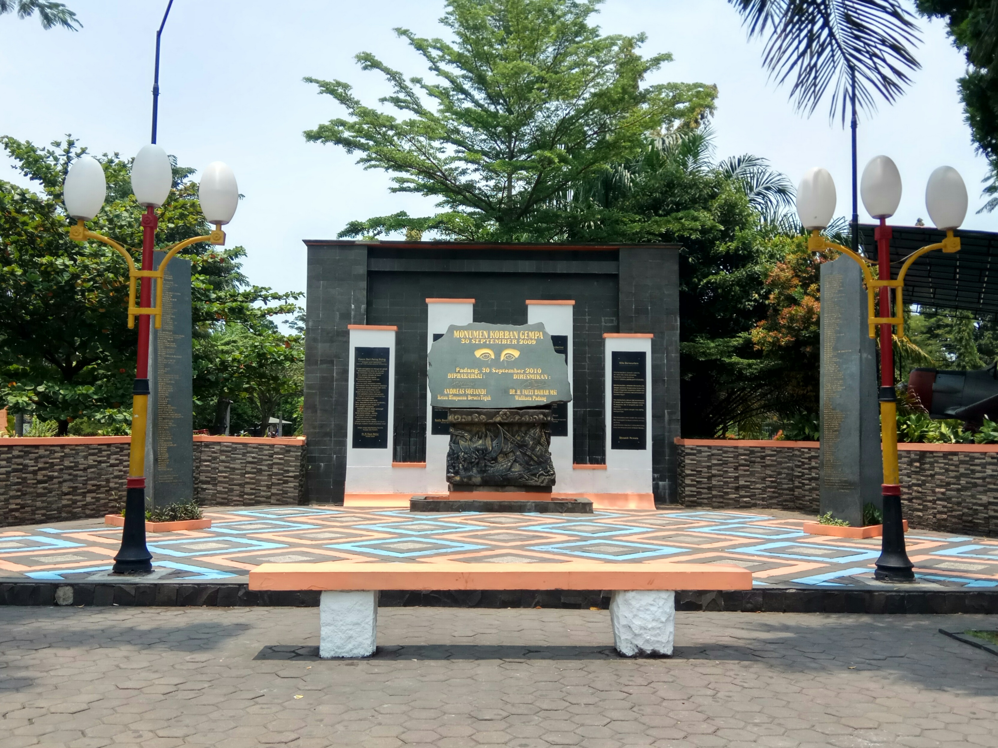 Tugu Gempa Padang 2018